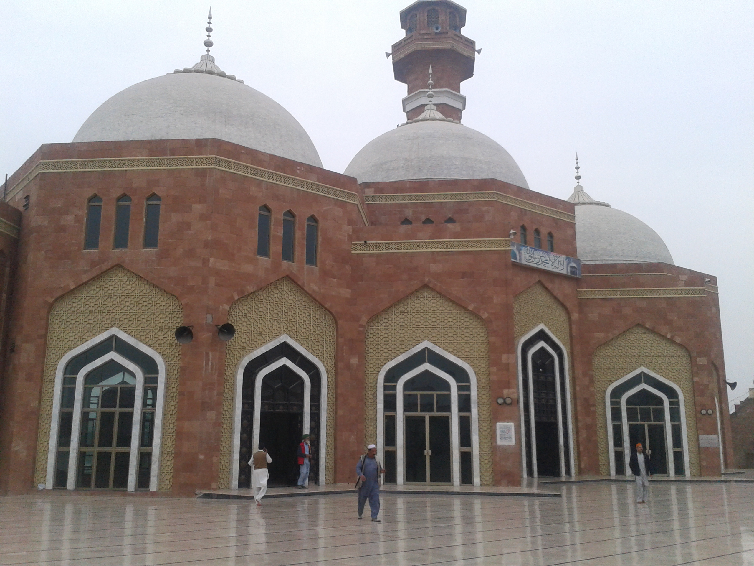 Mosque at Darbar Hazrat Baba Farid ud Deen Ganj Shakar Rahmatullah Alaih